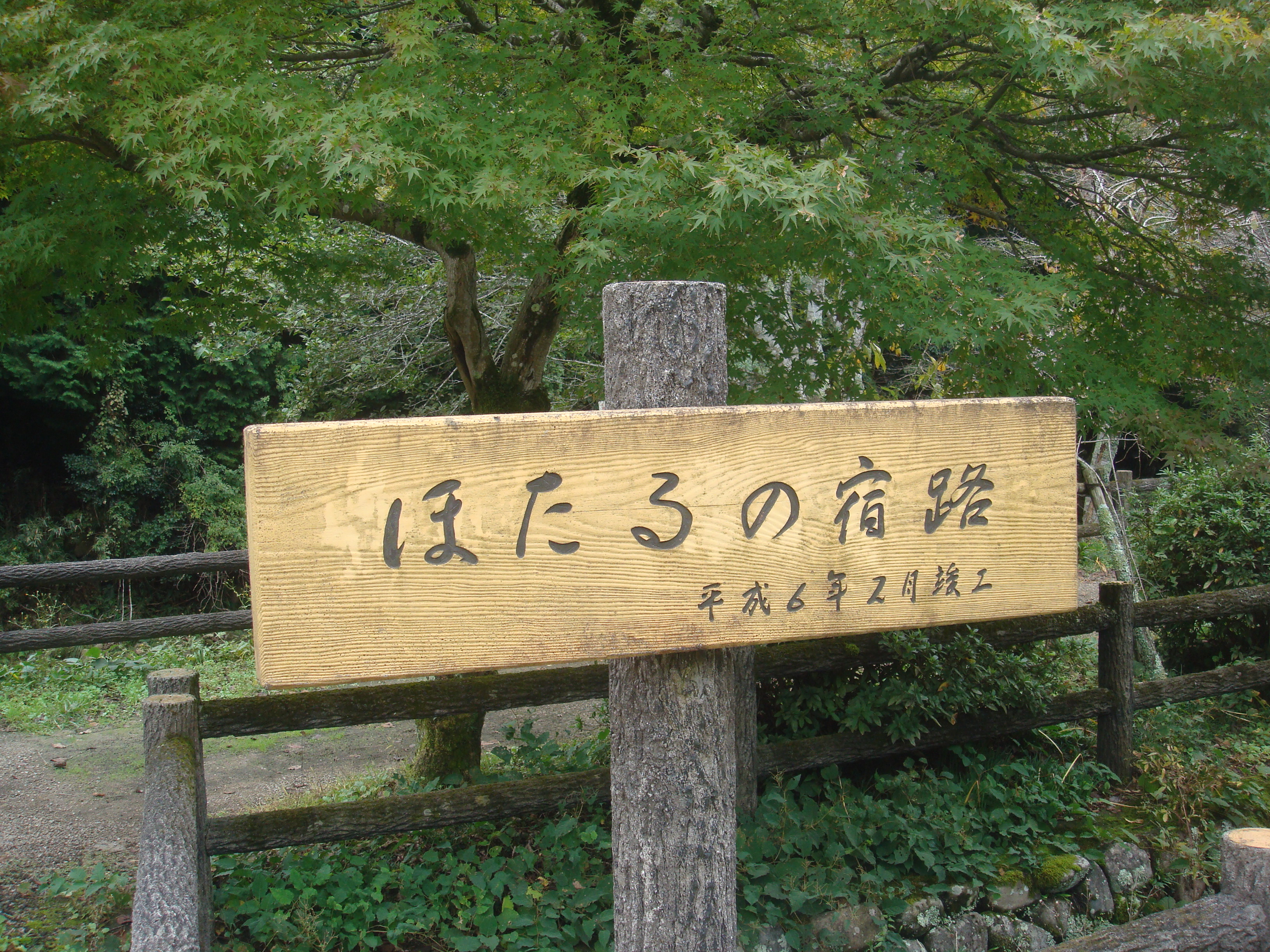 ホタルの旅路2